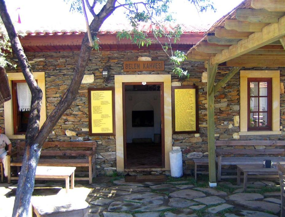 Belen Coffee House (Belen Kahvesi) in Çaybükü village, Muğla, Turkey